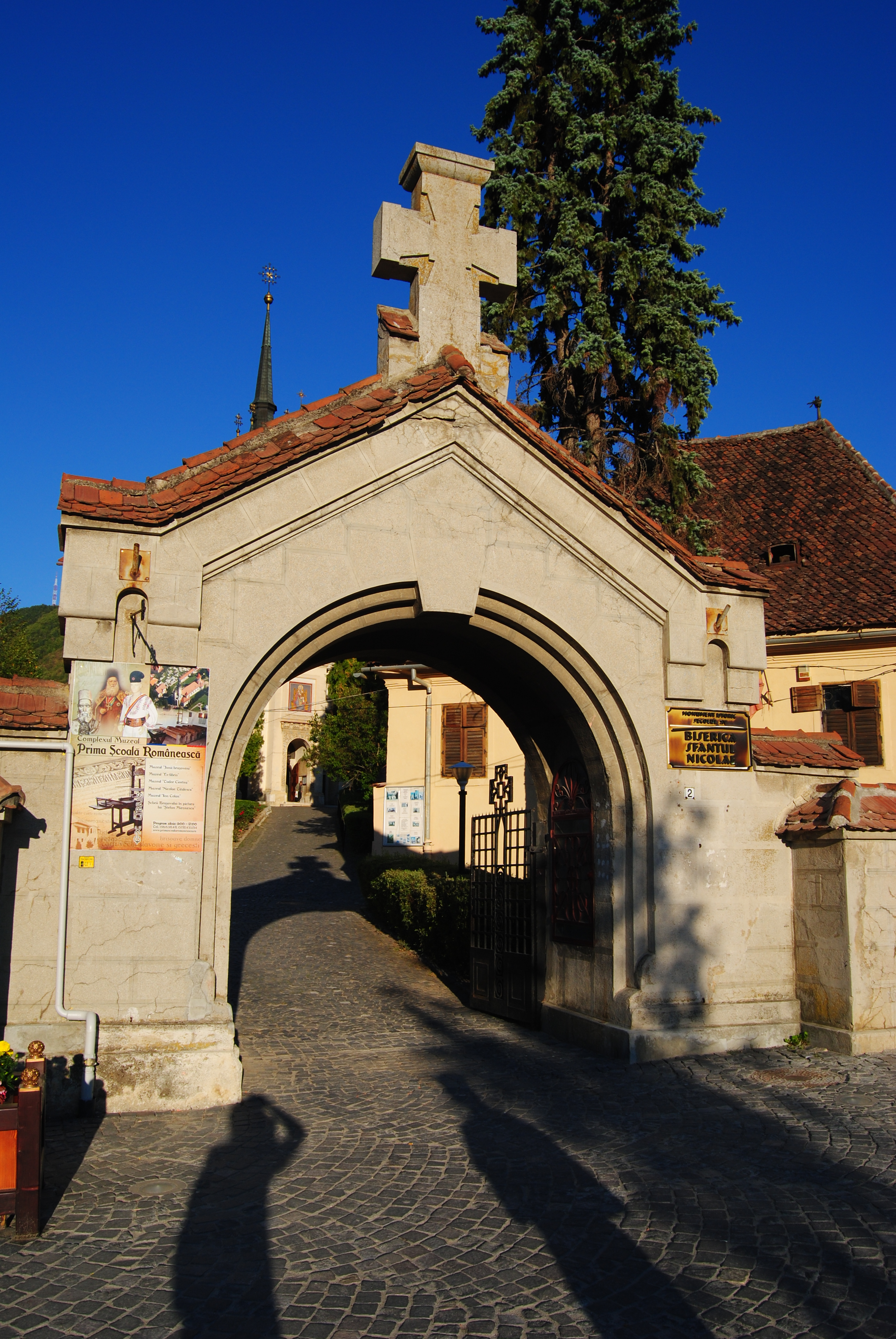 Zid de incintă, biserica Sf. Nicolae, Brașov 04